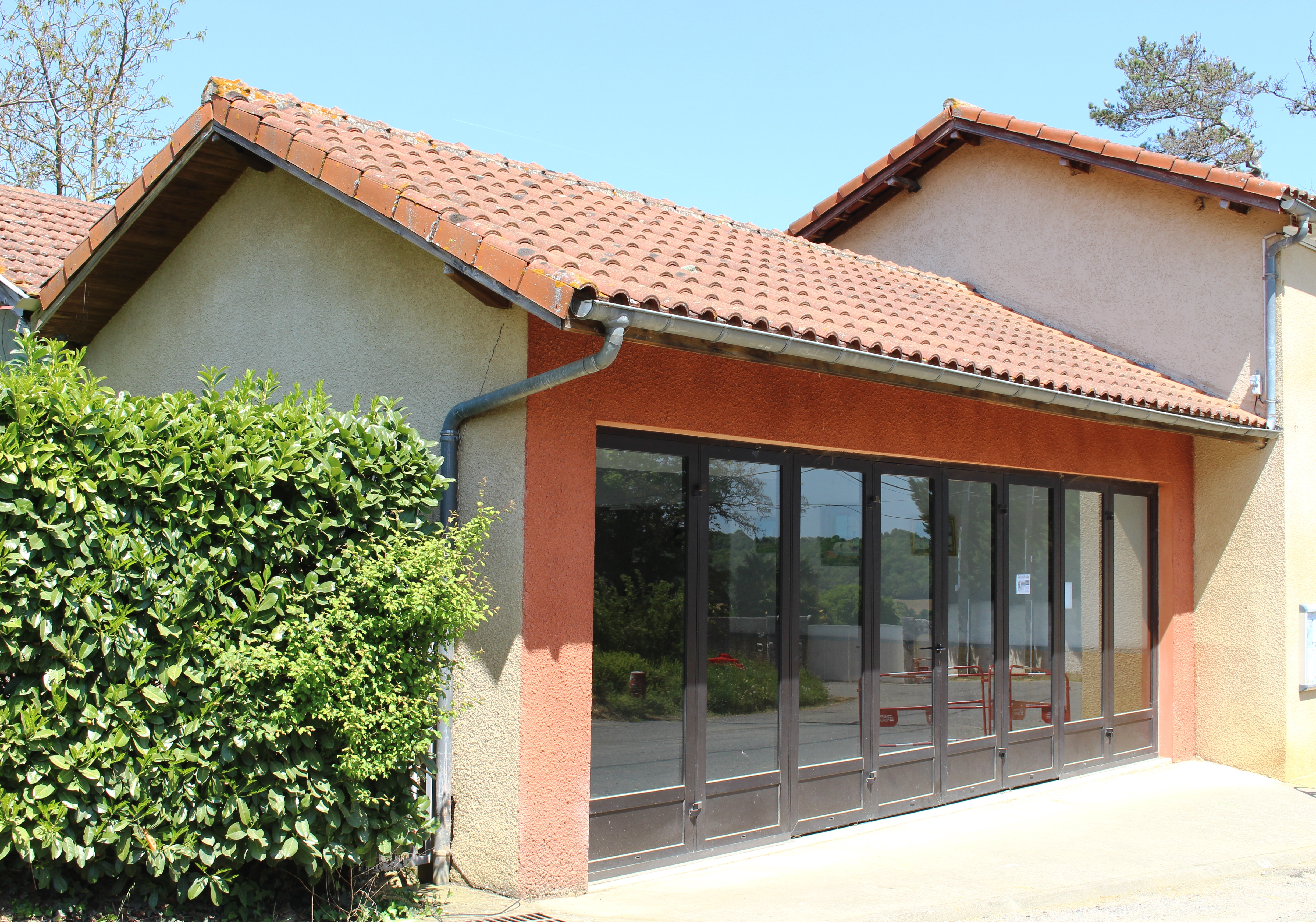 Salle des fêtes de Collongues (Hautes-Pyrénées)